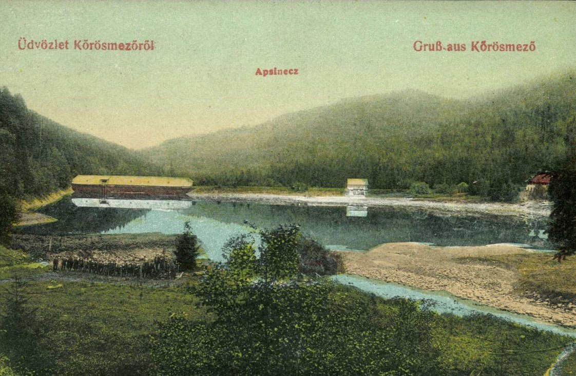 Кляуза на річці Апшинець, поштівка